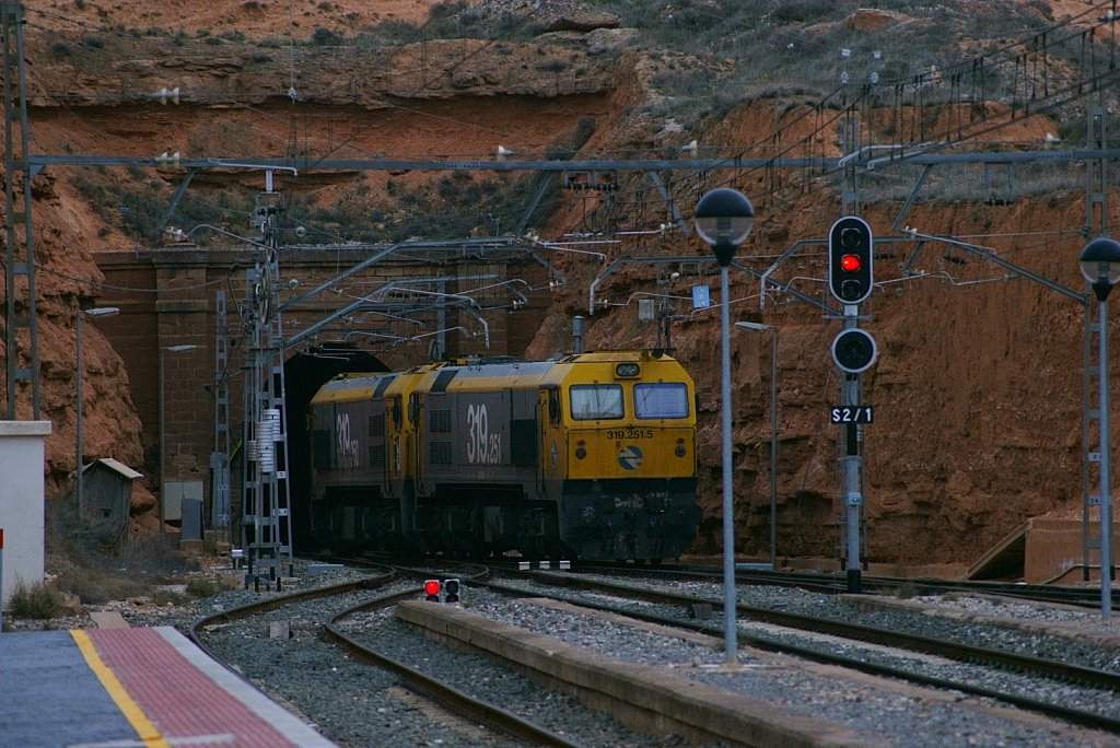 Un pareja de 319 maniobrando en Samper